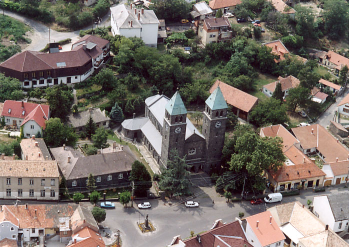 Badacsonytomaj - Hungary - Europe